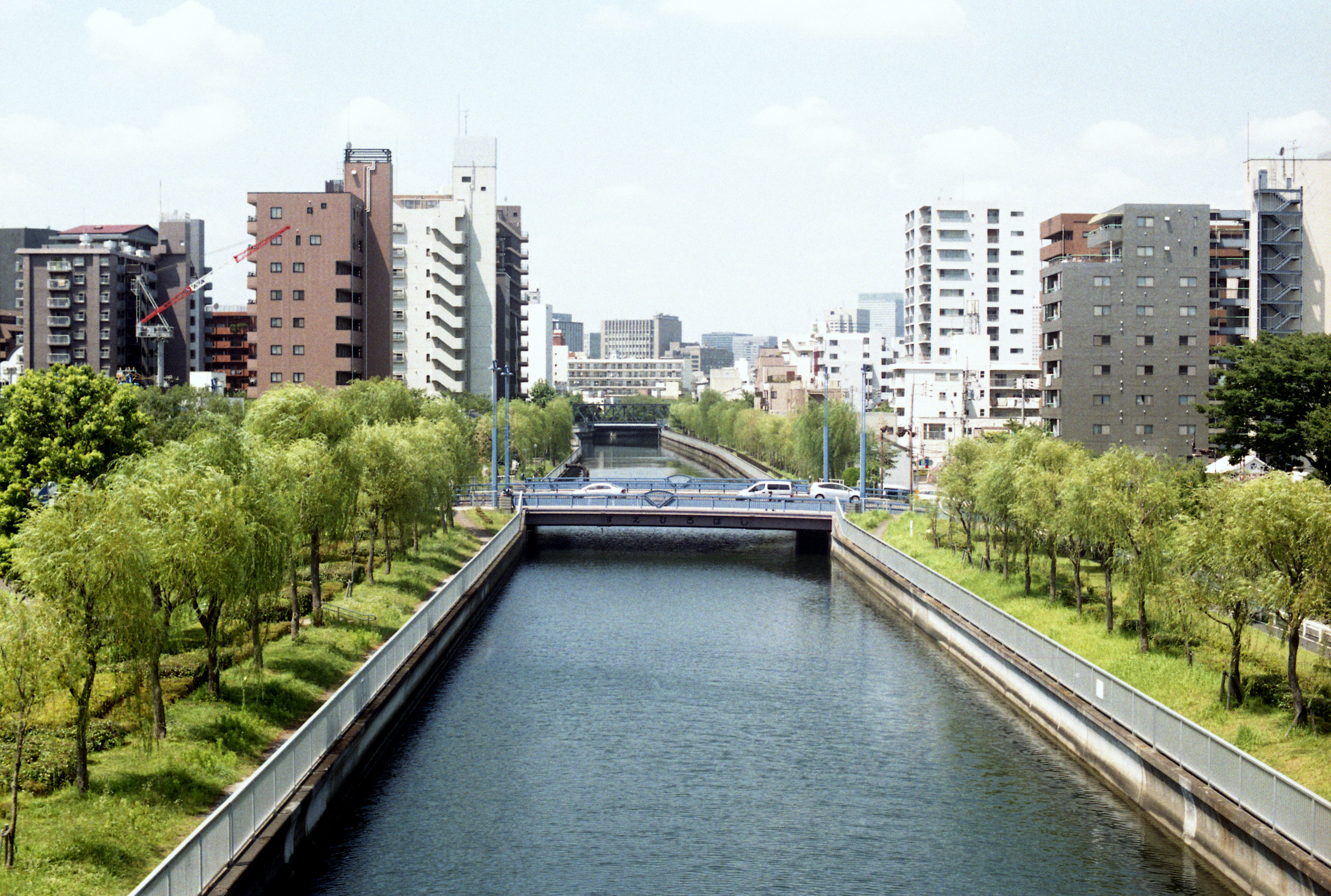 仙台掘川